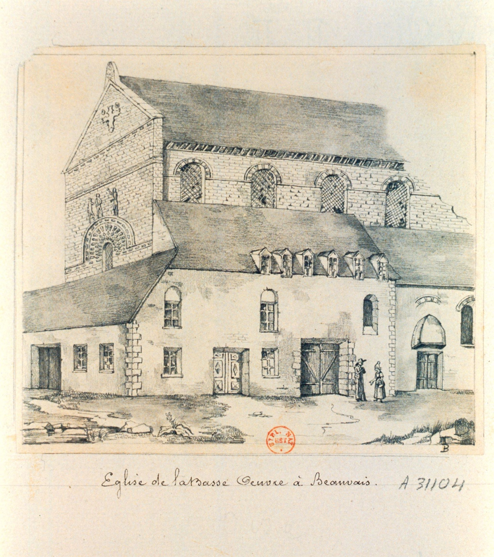 Église de la Basse-oeuvre de Beauvais abbaye Saint-Corneille Picardie